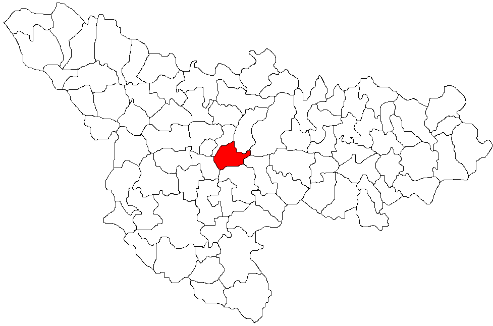 Categorie:Hărţi ale judeţului Timiş